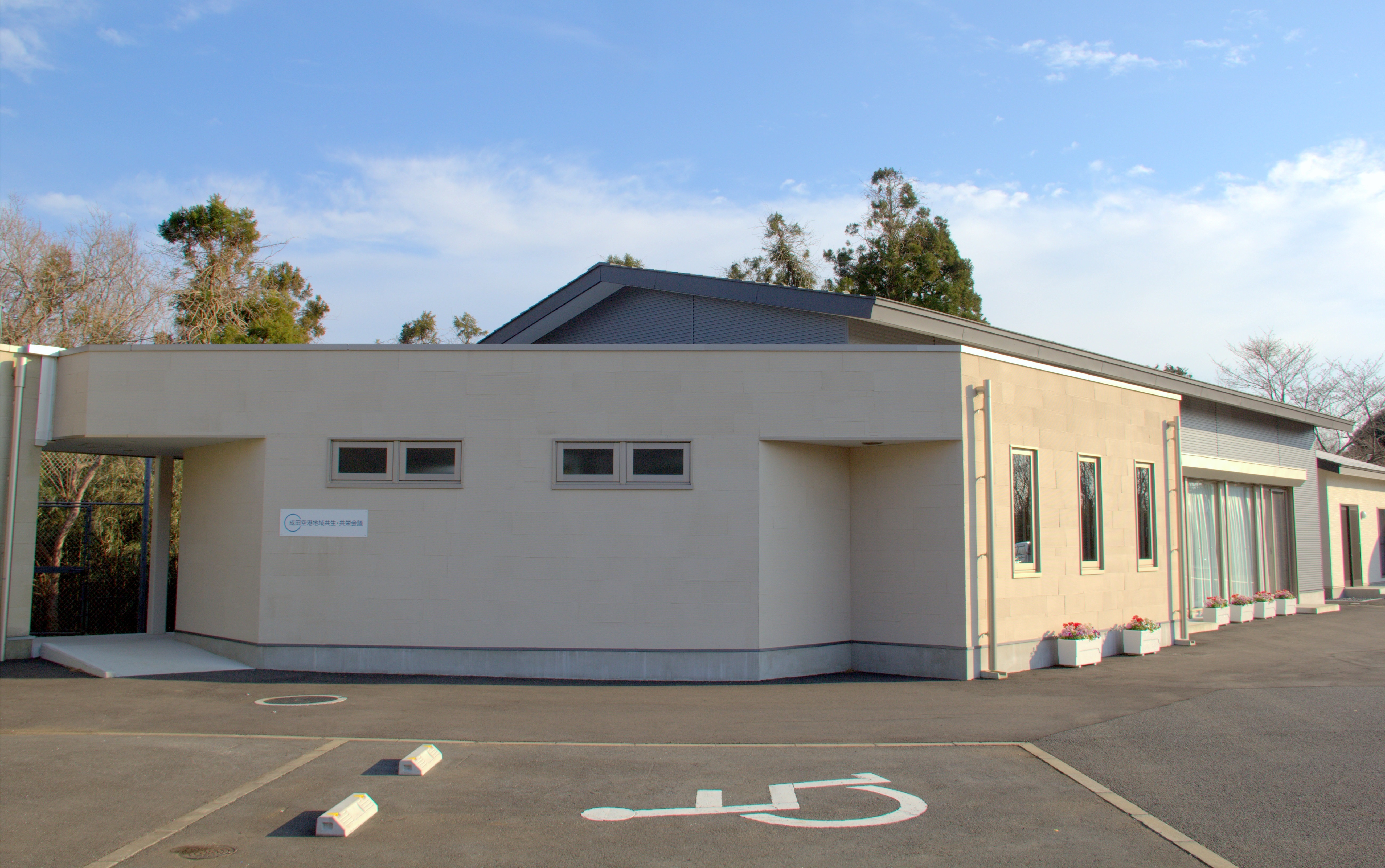 成田空港地域共生・共栄会議事務所